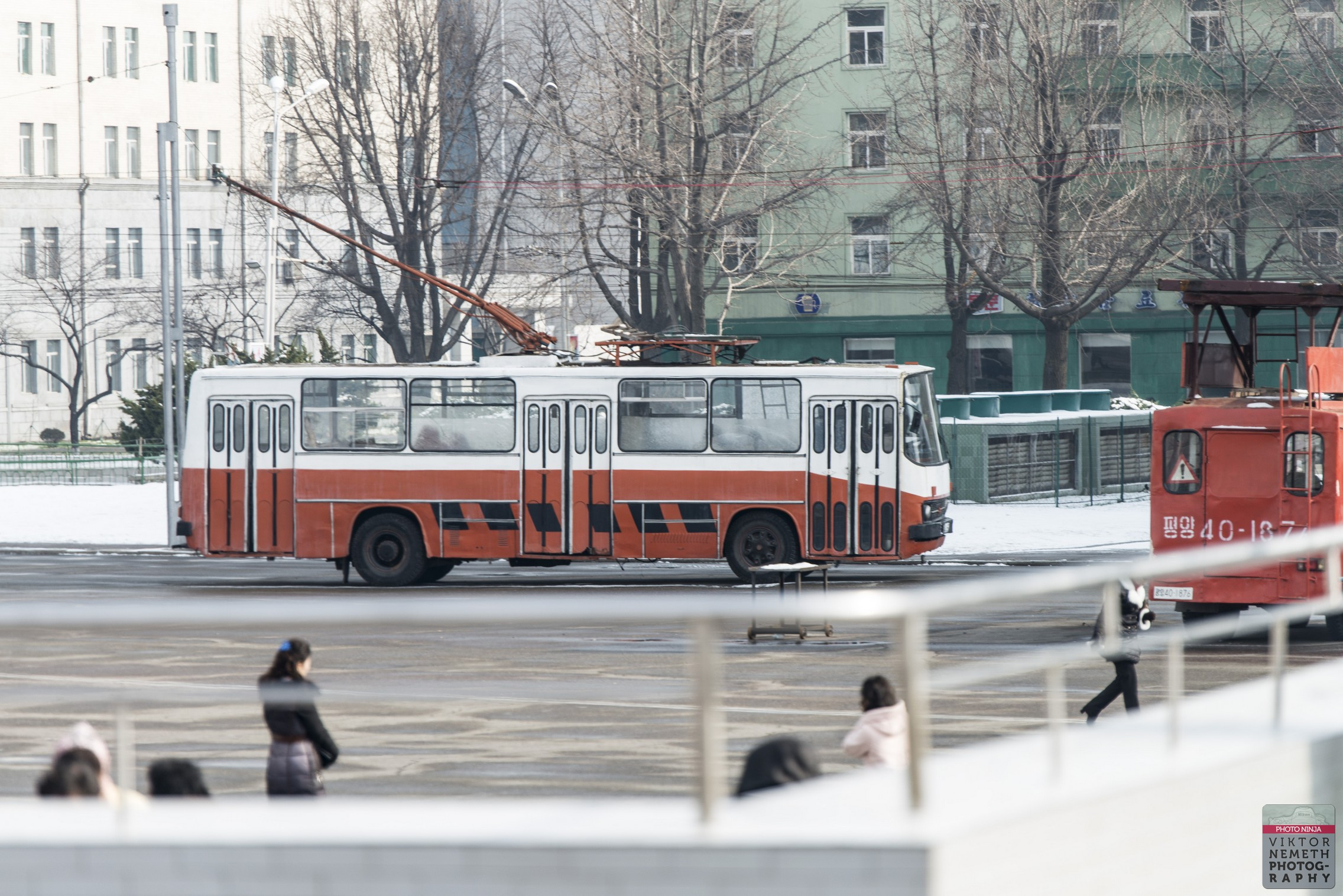 Ikarus 260T Phenjanban (2015/11)